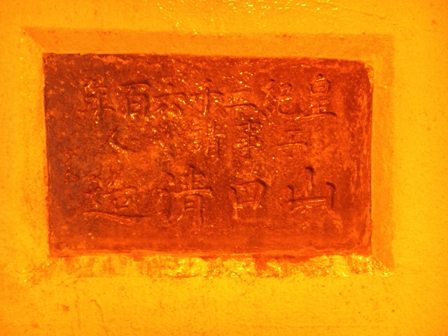 逗子市久木－山の根間の久木隧道内にある銘板。「皇紀二千六百年 工事請負人 山口清造」